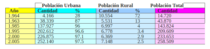 Población de Floridablanca y distribución según DANE 2005